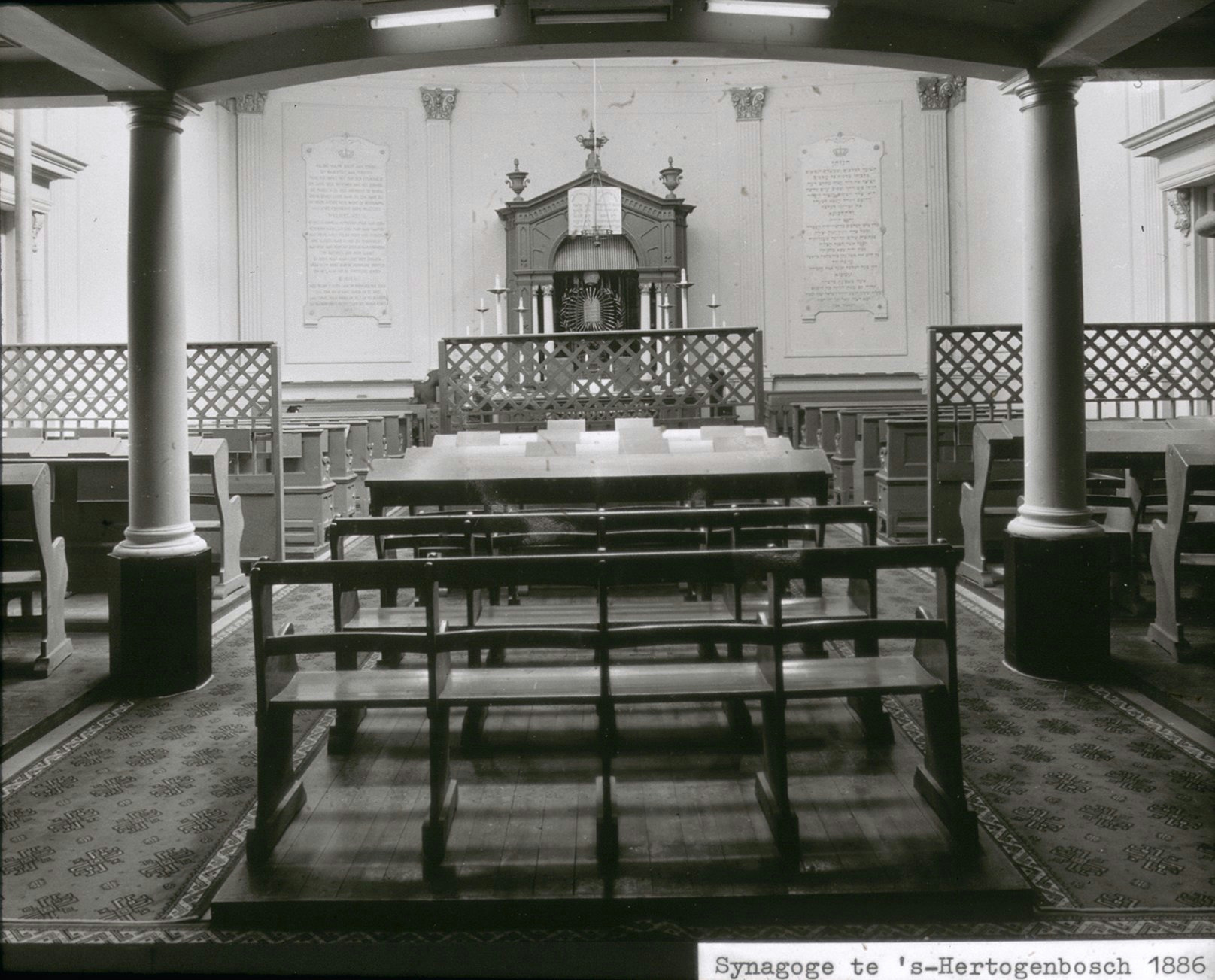 Synagoge: INTERIEUR, OVERZICHT MET ARKE